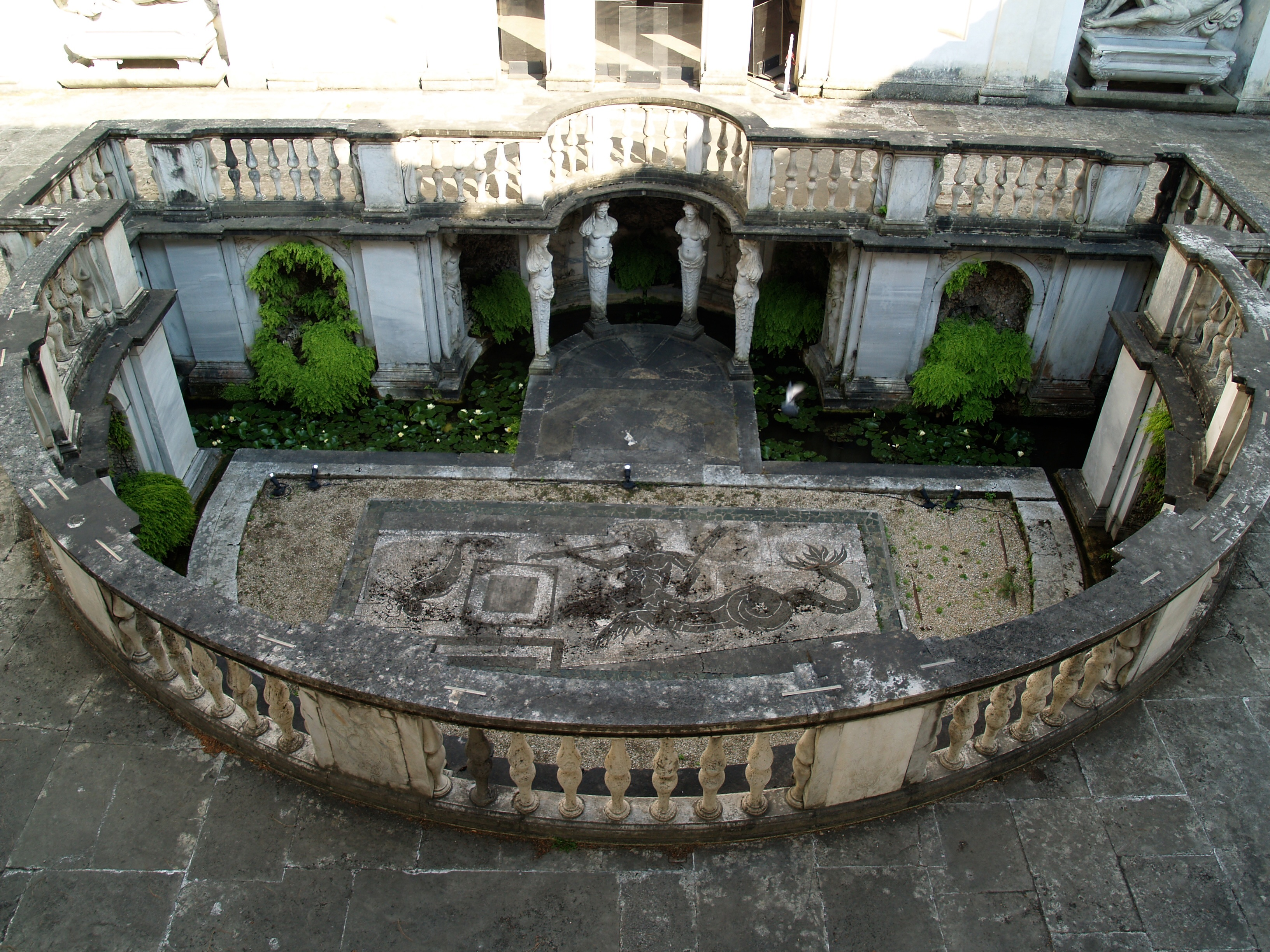 Roma. Villa Giulia. Ninfeo.